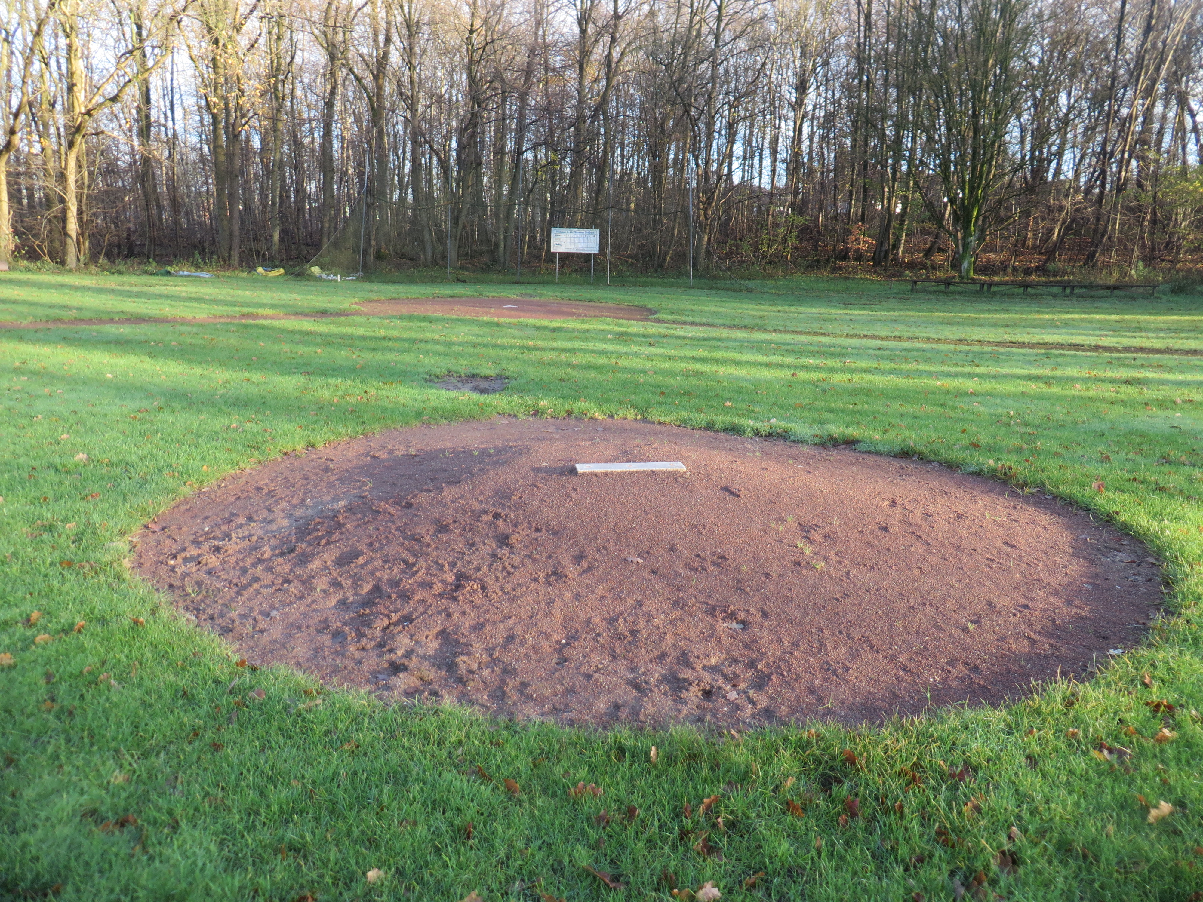 Ehrenhain (Flensburg-Mürwik-Fruerlund 2017), Bild 05